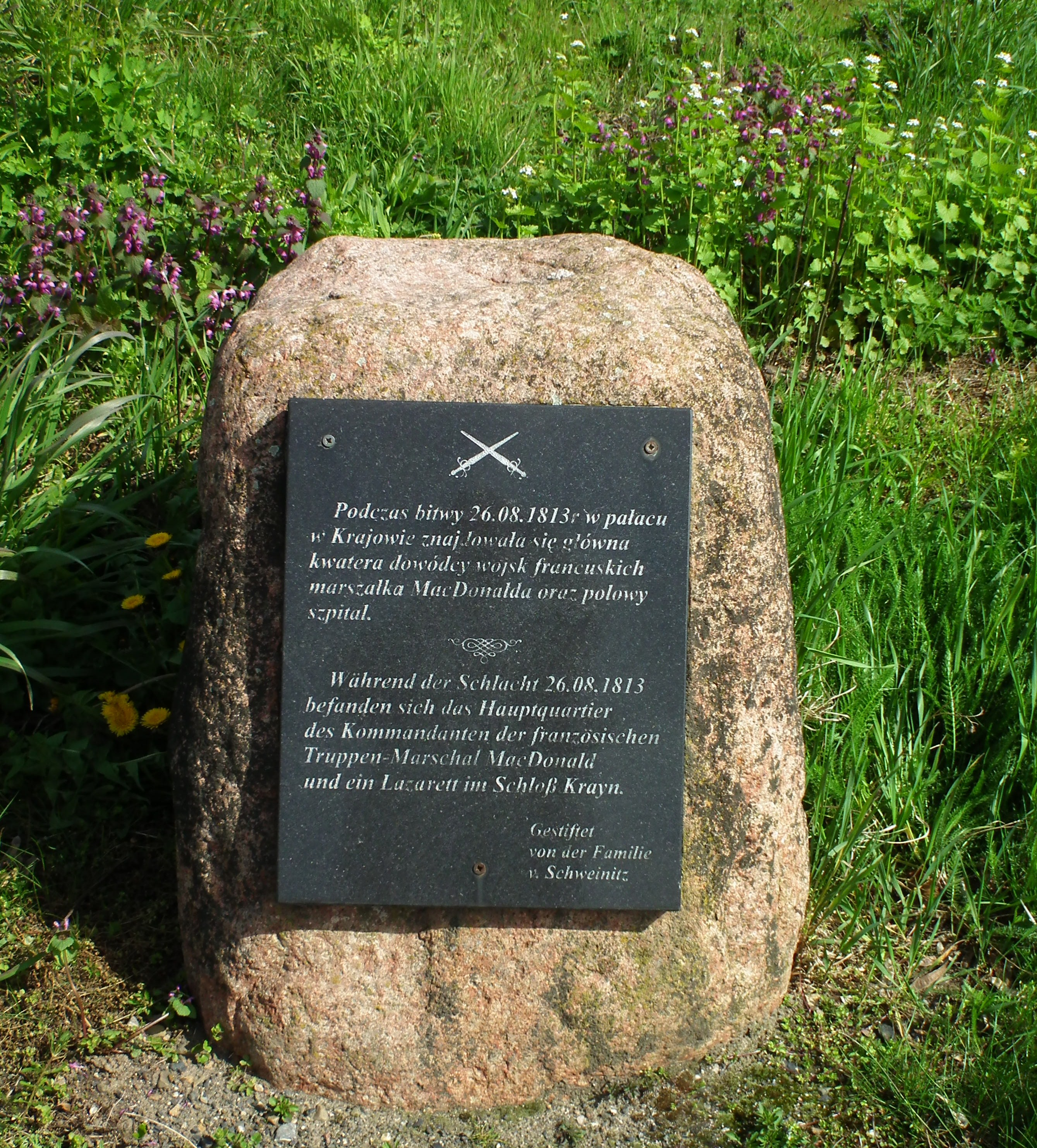 Krajów - wieś pod Legnicą. Pomnik kwatery francuskiej w bitwie nad Kaczawą.